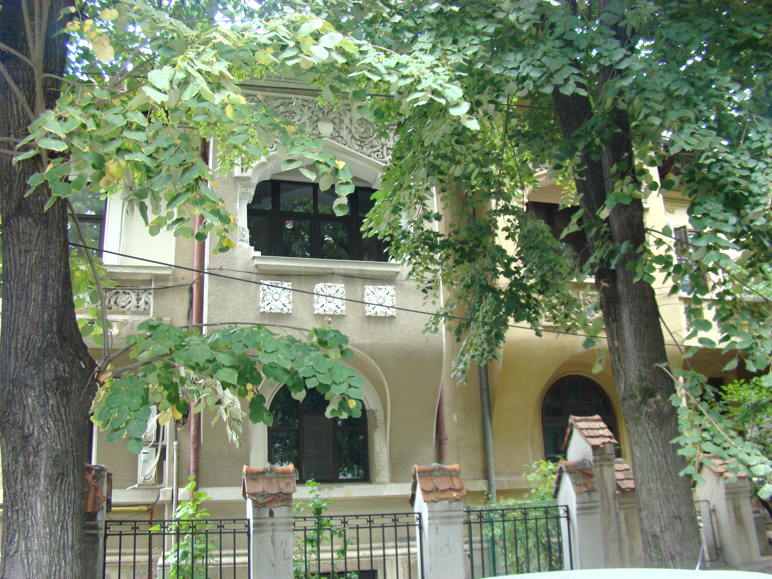 Casă monument istoric, str. Roma, nr. 54-56